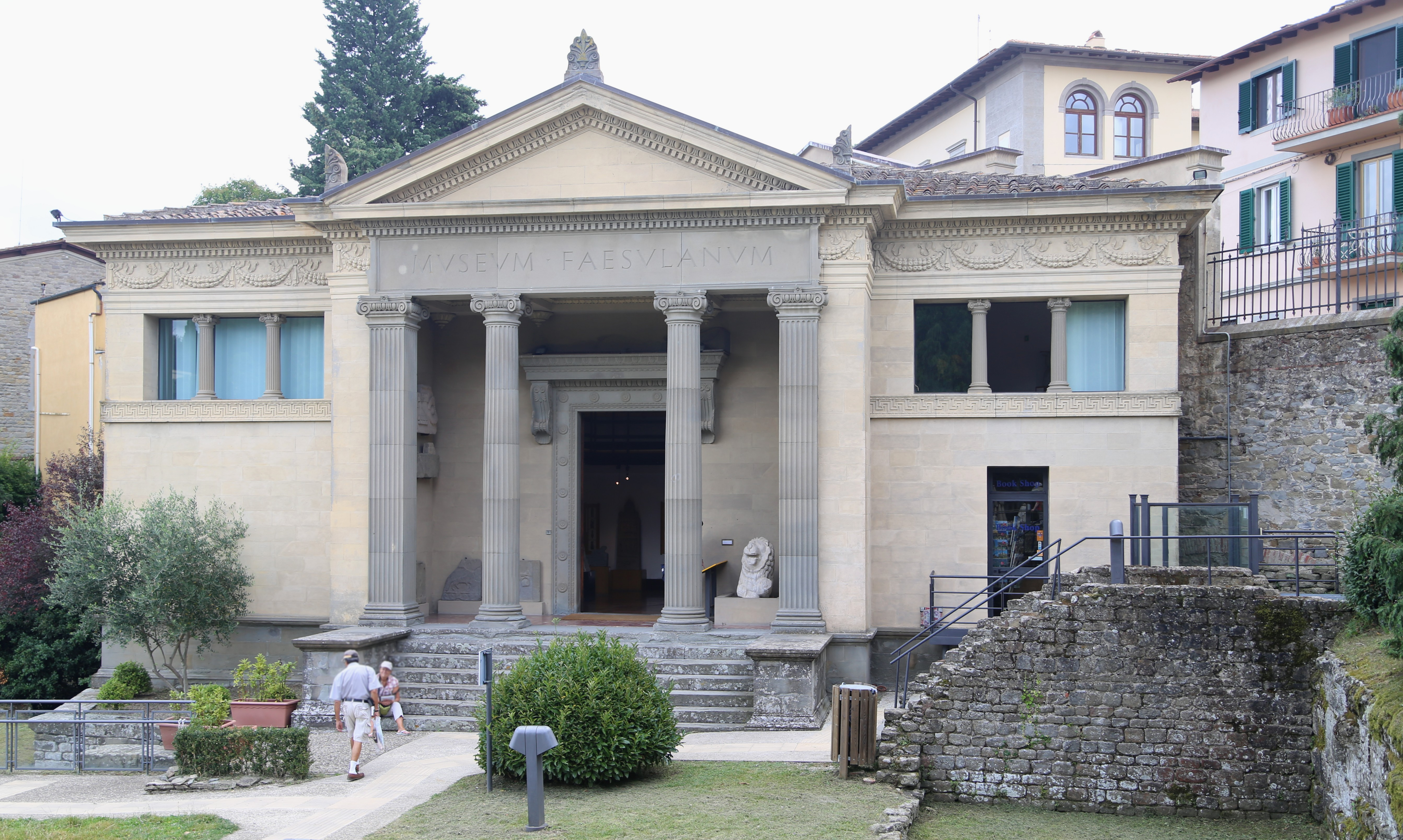 Archäologisches Museum, Fiesole